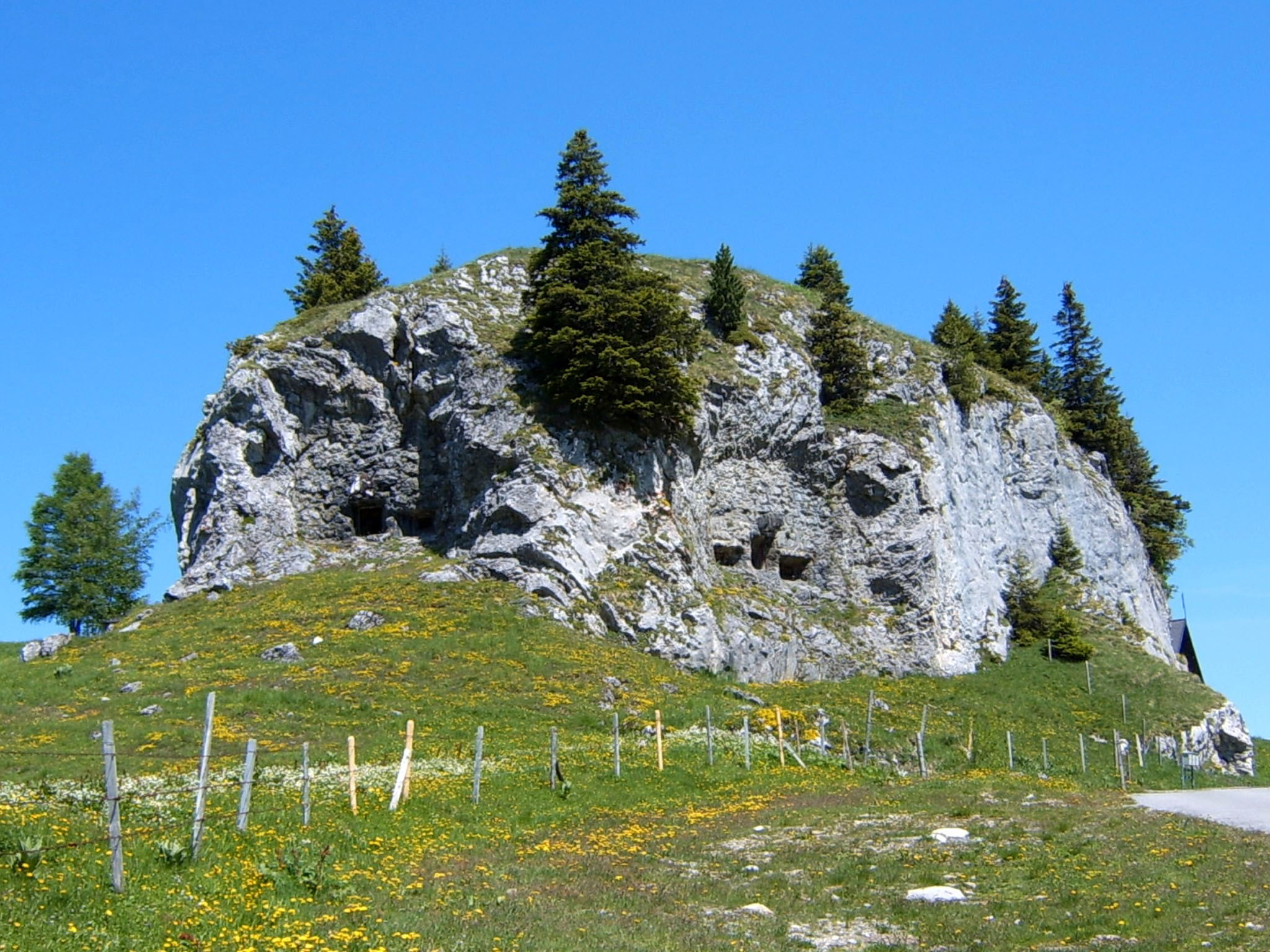 Gruyère Pays-d'Enhaut: Infanteriebunker A 322 569755/137840